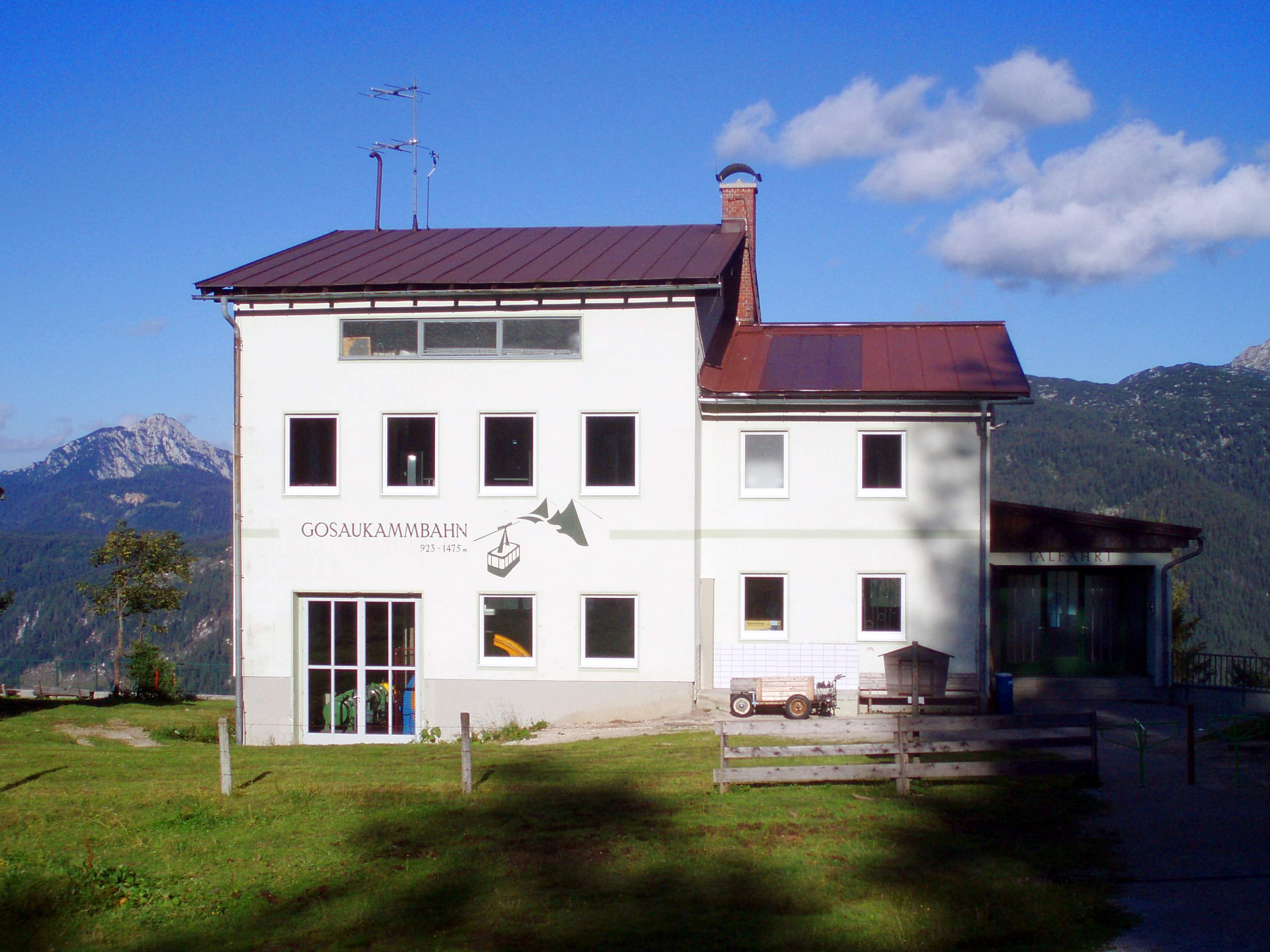 Bergstation der Gosaukammbahn